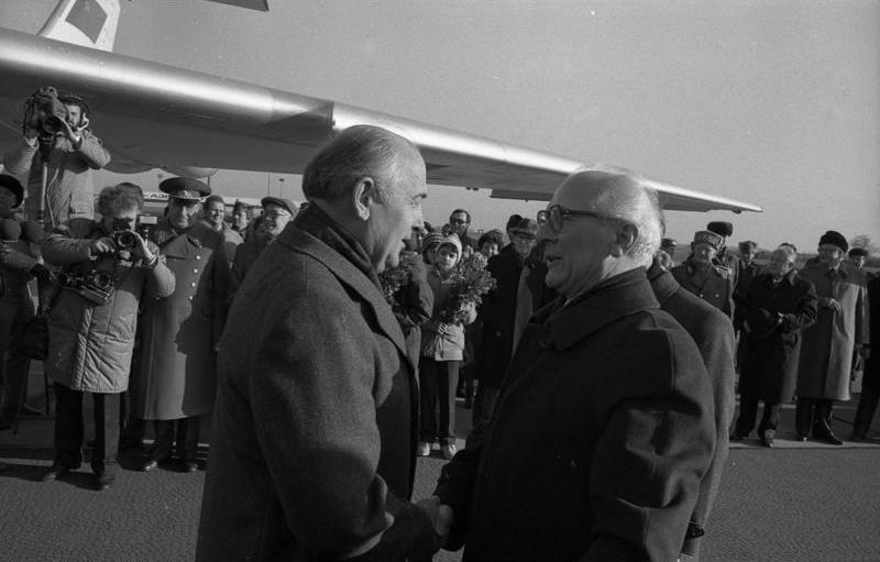 Berlin, Michail Gorbatschow, Erich Honecker ADN-ZB / Koard / 11.12.87 - Berlin: Treffen Zum Treffen der führenden Repräsentanten der Teilnehmerstaaten des Warschauer Vertrages traf der Generalsekretär des ZK der KPdSU, Michail Gorbatschow, aus den USA kommend in der DDR-Hauptstadt ein. Auf dem Flughafen Berlin-Schönefeld wurden er und die ihn begleitenden Persönlichkeiten vom Generalsekretär des ZK der SED und Vorsitzenden des Staatsrates der DDR, Erich Honecker, und von weiteren Mitgliedern der Partei- und Staatsführung brüderlich willkommen geheißen. Abgebildete Personen: Honecker, Erich: Staatsratsvorsitzender, Generalsekretär des ZK der SED, DDR (GND 118553399) Gorbatschow, Michail: Präsident, Vorsitzender des Obersten Sowjets, Friedensnobelpreisträger, Sowjetunion